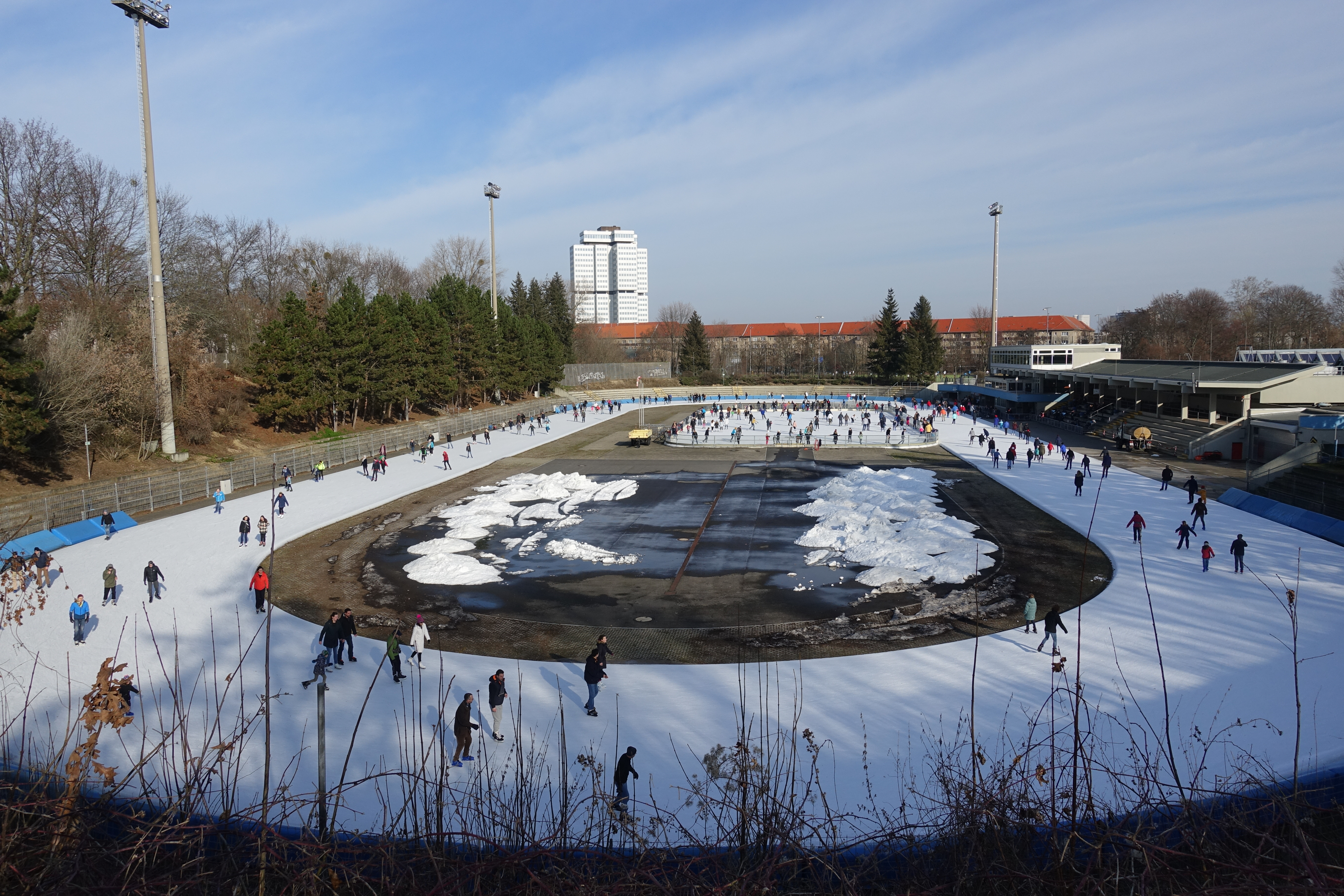 Horst-Dohm-Eisstadion in Berlin-Schmargendorf